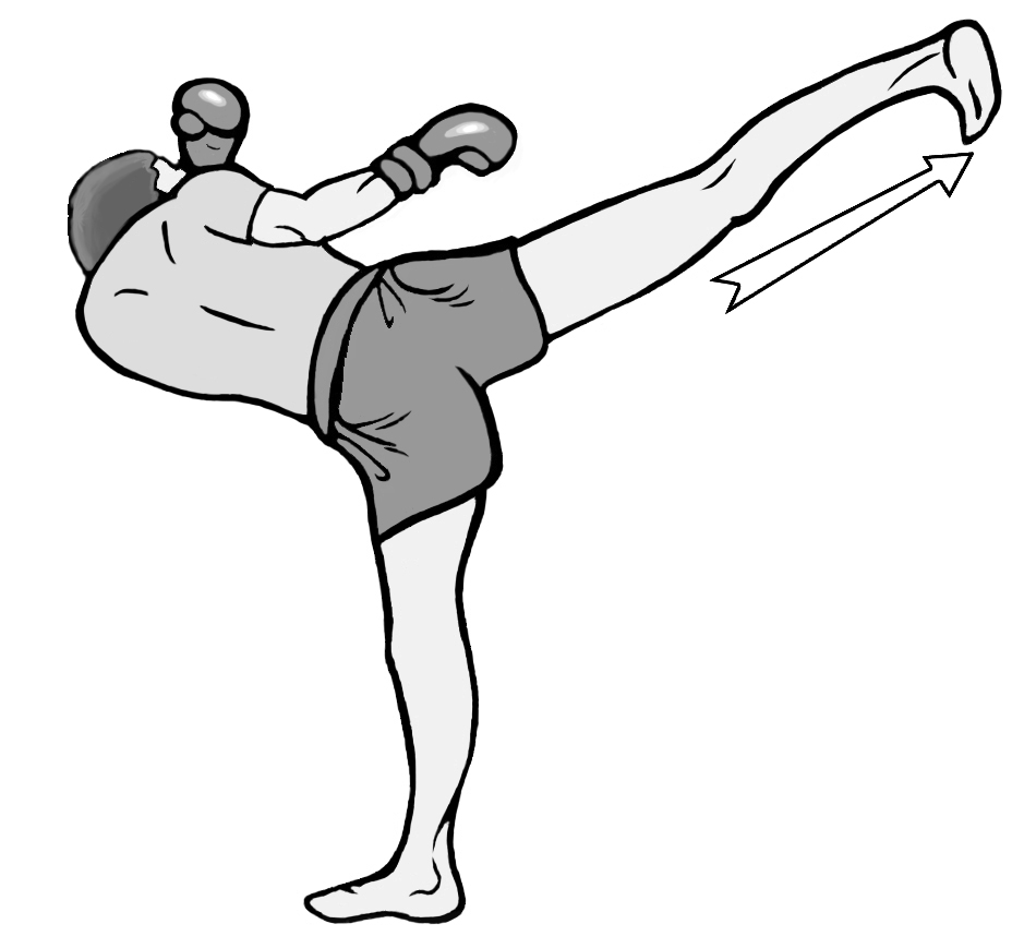 cardio1.jpg